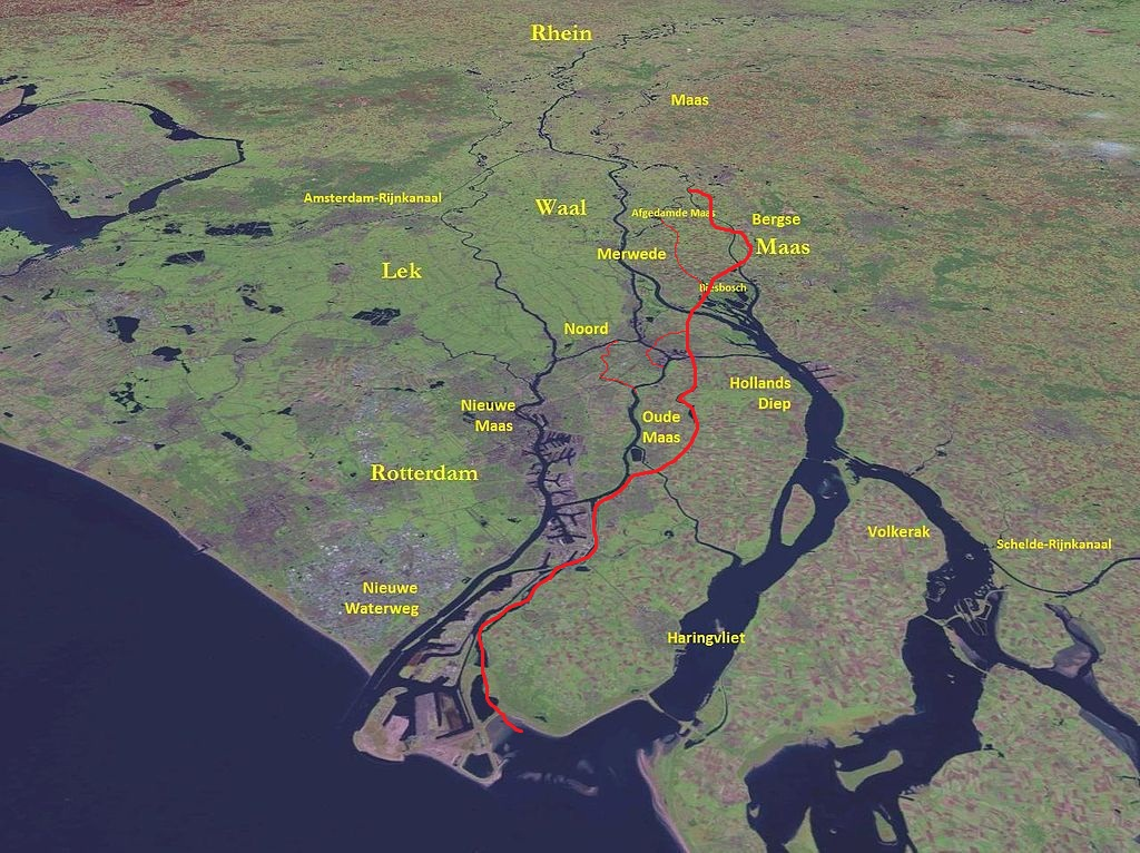 In rood wordt bij benadering de loop van de Middeleeuwse Maas weergegeven, in vergelijking met de Maas- en Rijnmond van vandaag de dag